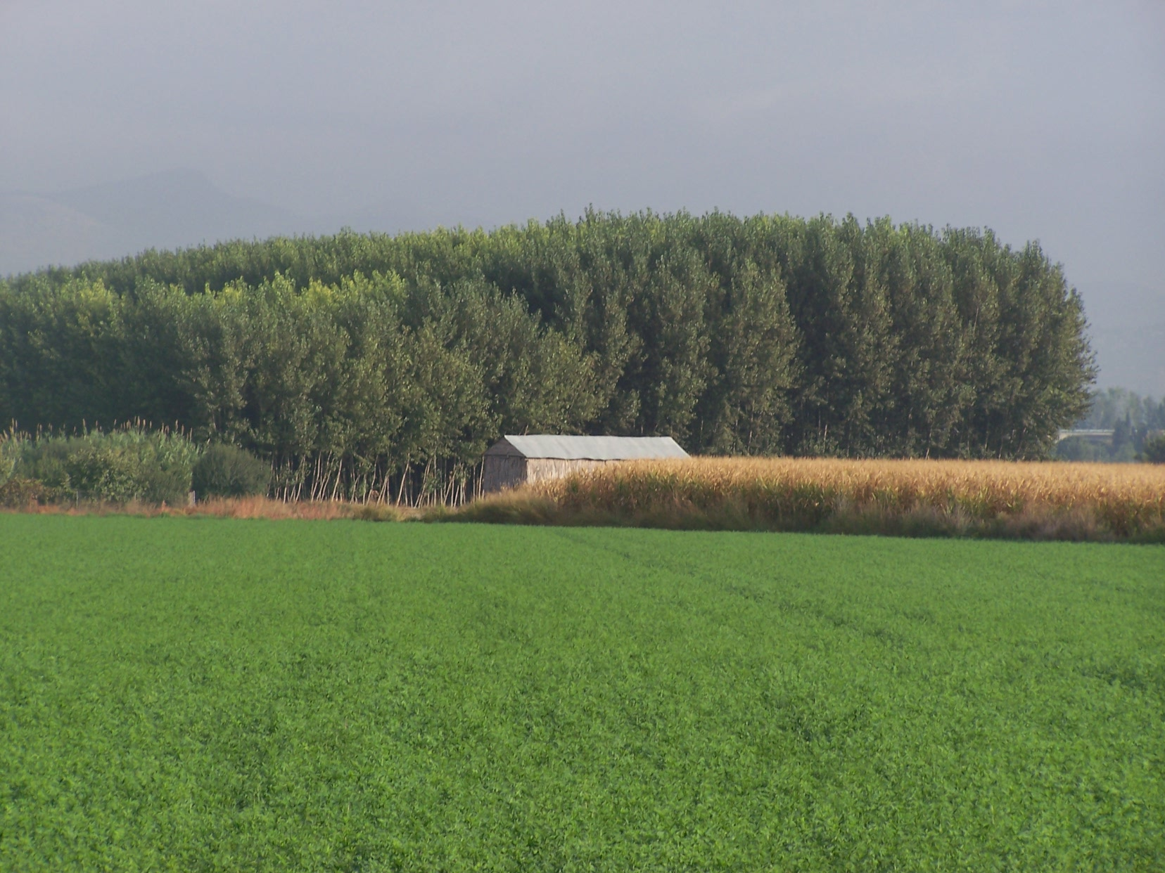 Vista del campo en el municipio de Vegas del Genil, en la provincia de Granada (España)